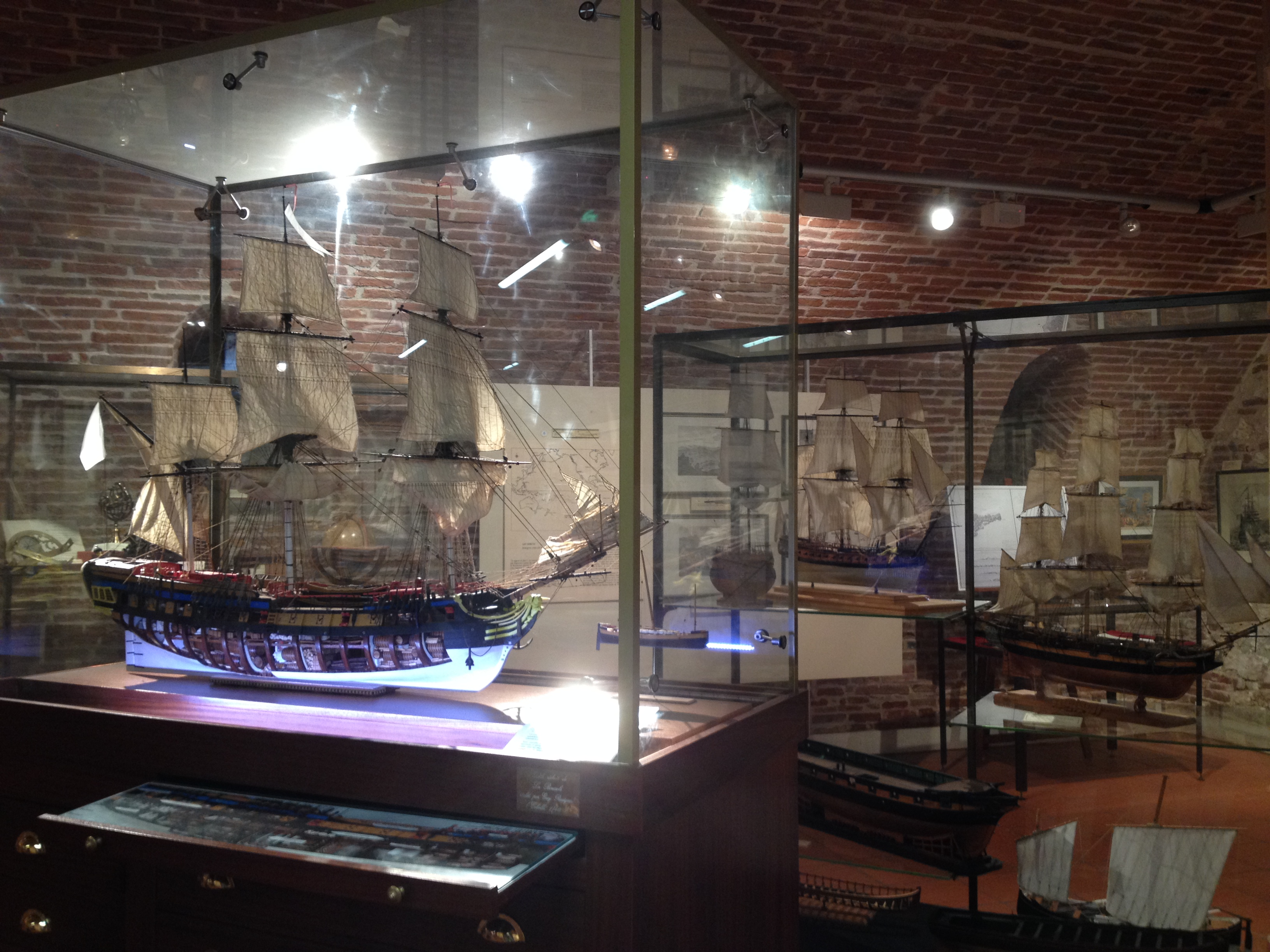 A gauche : reconstitution de La Boussole à l'échelle 1/40 (réalisée par l'albigeois Guy Rossignol) A droite : reconstitution de l'Astrolabe (par Mr Rossignol), de l'Hermione (dépôt en 2013), et autres maquettes.